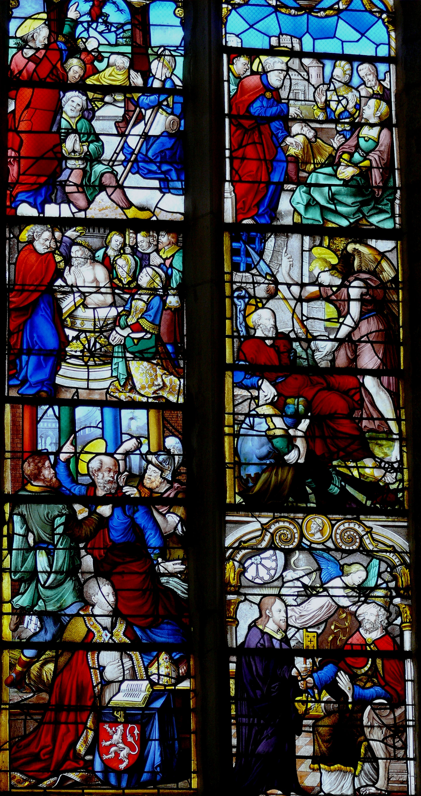 Ferrières - Abbaye - Eglise Saint-Pierre-et-Saint-Paul - Vitrail de la vie de saint Pierre